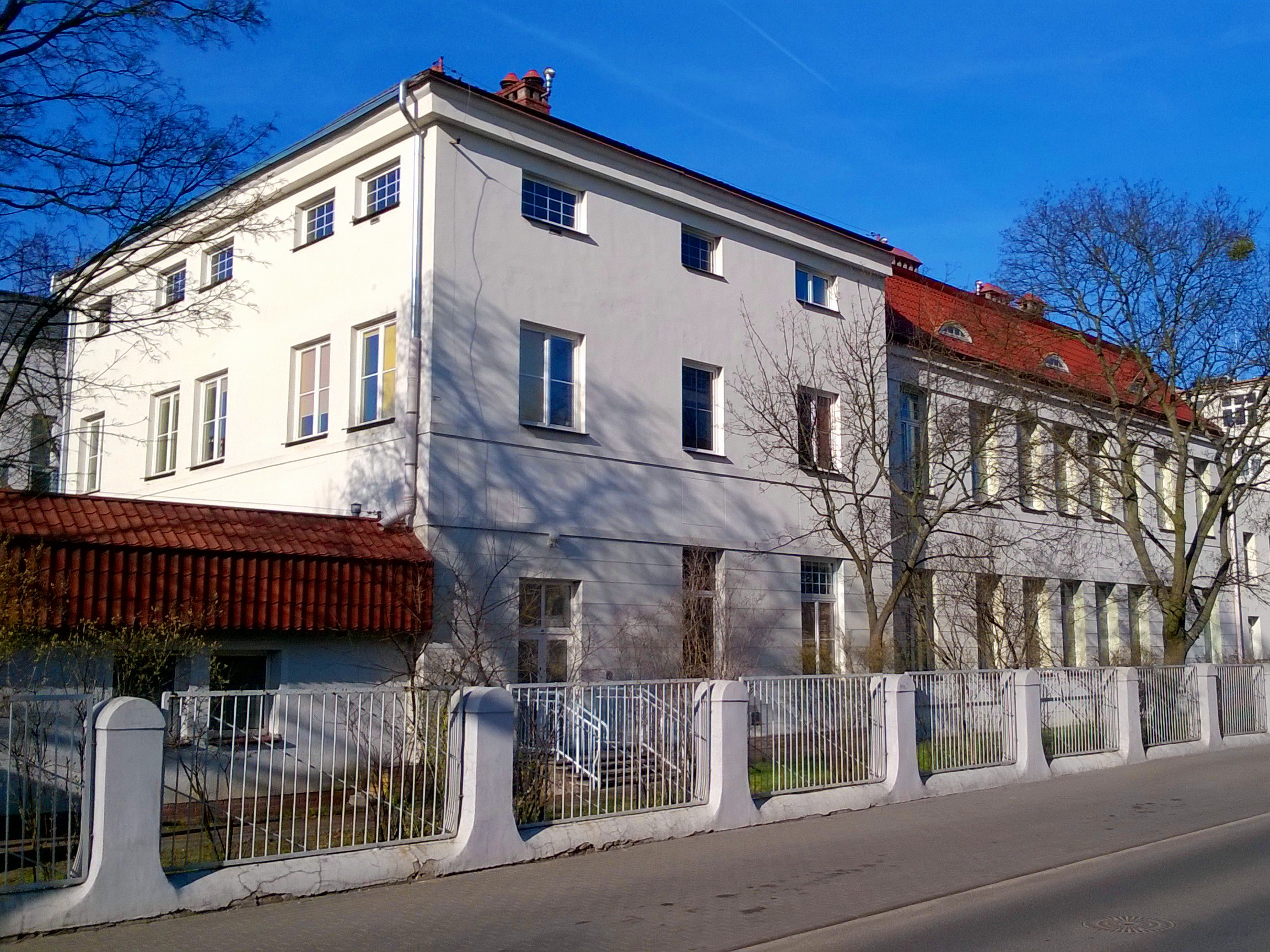 Szpital Miejski w Toruniu7